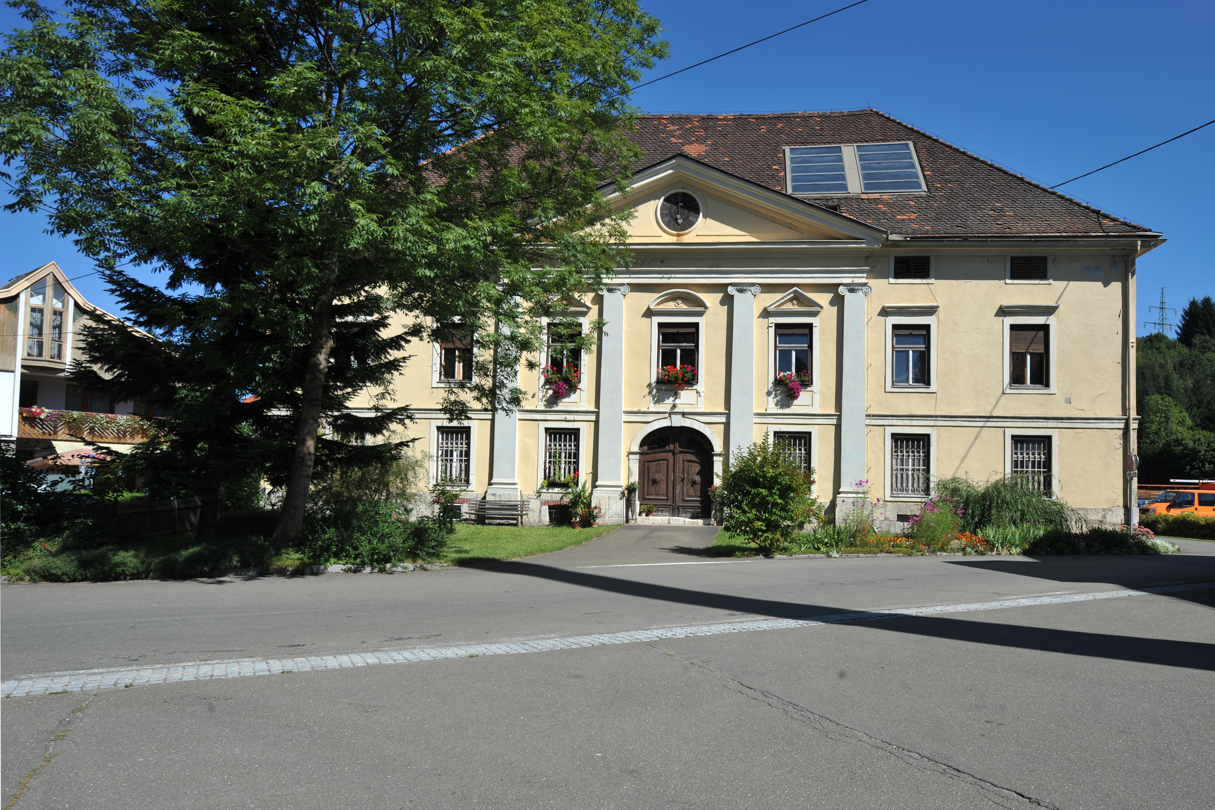 Ehem. Hammerherrenhaus Dieses Foto wurde im Rahmen des von Wikimedia Österreich unterstützten Projekts Wiki takes oberes Murtal erstellt. The making of this work was supported by Wikimedia Austria. For other files made with the support of Wikimedia Austria, please see the category Supported by Wikimedia Österreich.